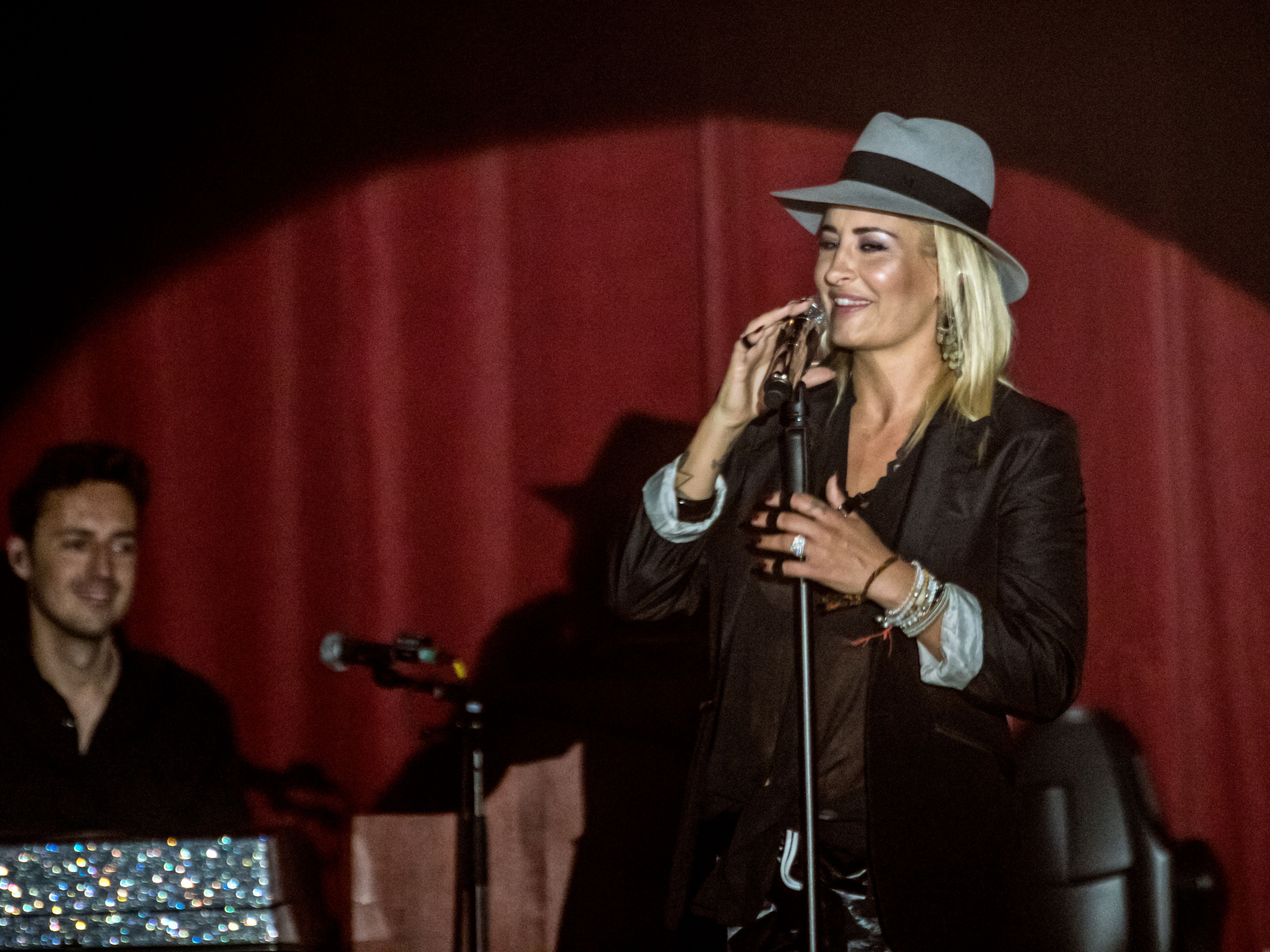 Bilder vom Zelt Musik Festival 2016 in Freiburg im Breisgau Sarah Connor